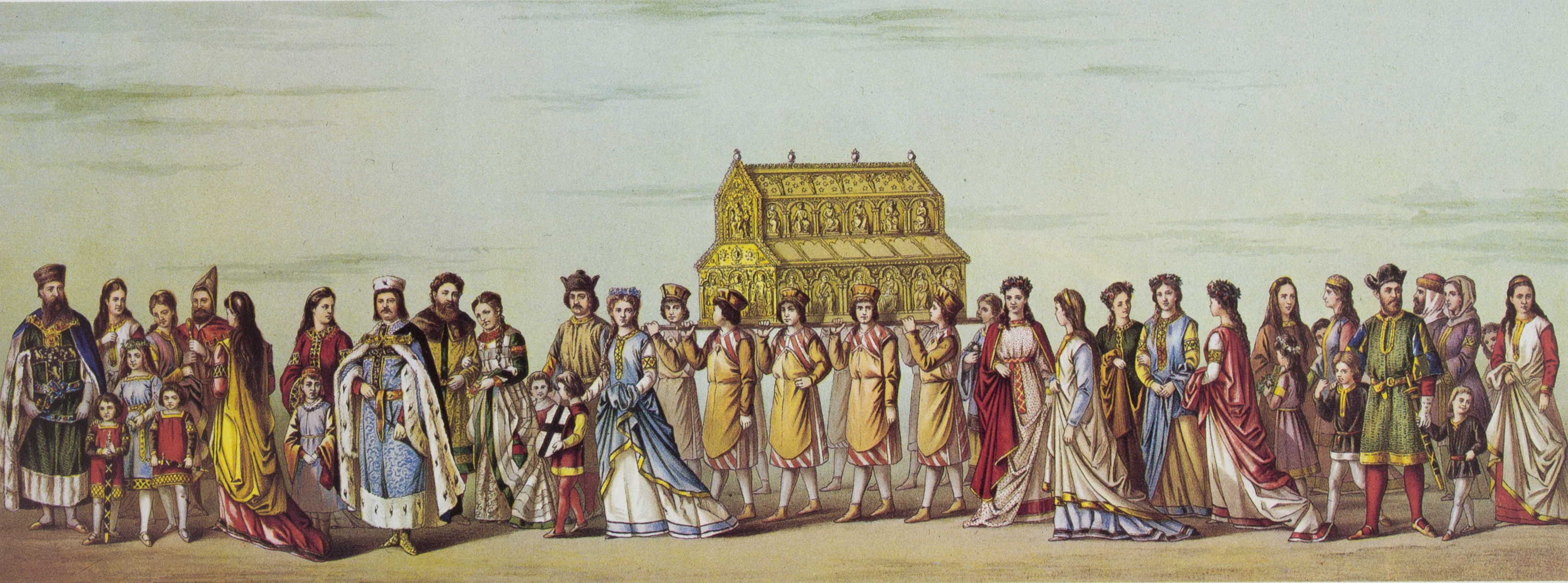 Tony Avenarius: Historischer Festzug veranstaltet bei der Feier der Vollendung des Kölner Doms am 18. October 1880. Tafel II